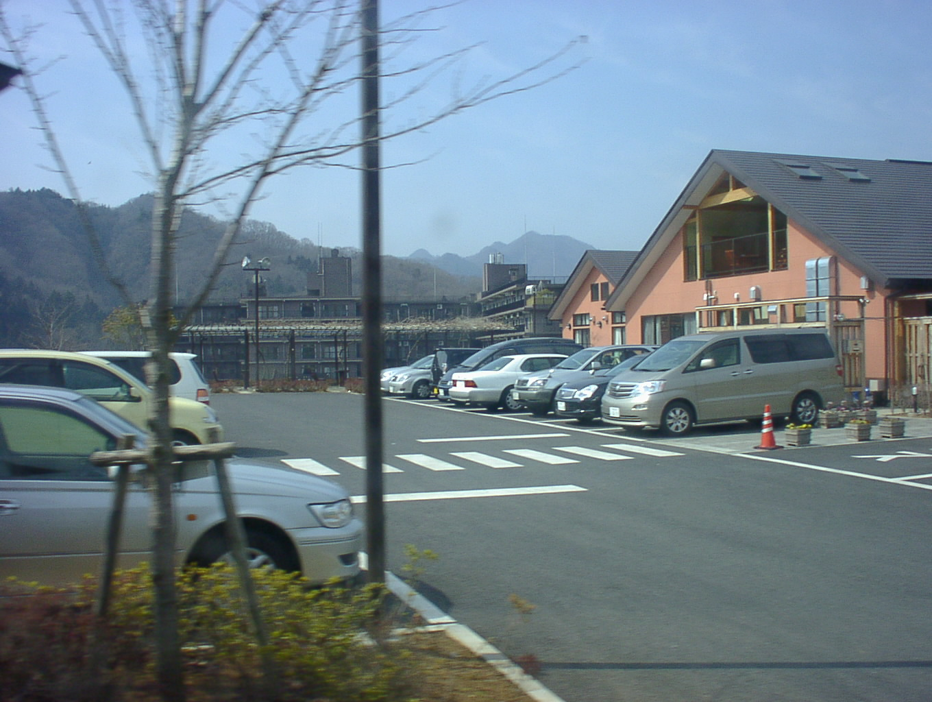 ふじの温泉